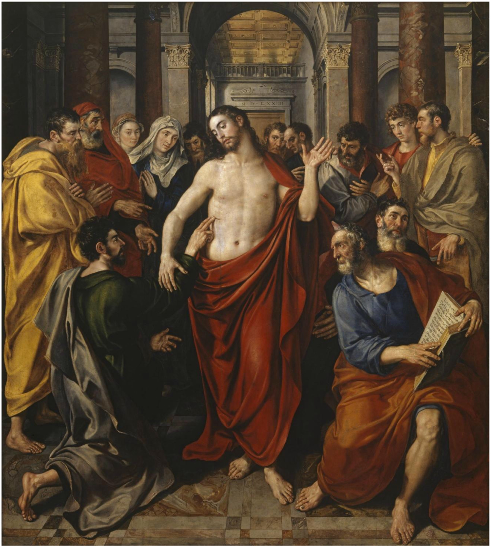 The incredulity of Thomaslabel QS:Len,"The incredulity of Thomas"label QS:Lru,"Алтарь Святого Томаса. Королевский музей изящных искусств"